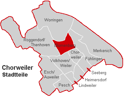 Lagekarte Blumenberg im Stadtbezirk Köln-Chorweiler